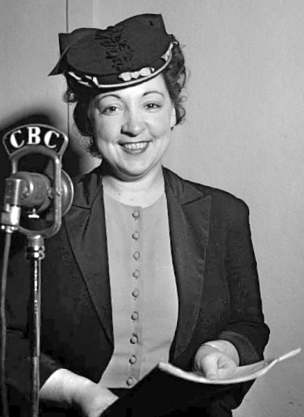 Juliette Huot, comédienne de la série radiophonique Taxi numéro 1, dans un studio de Radio-Canada à Montréal en 1945